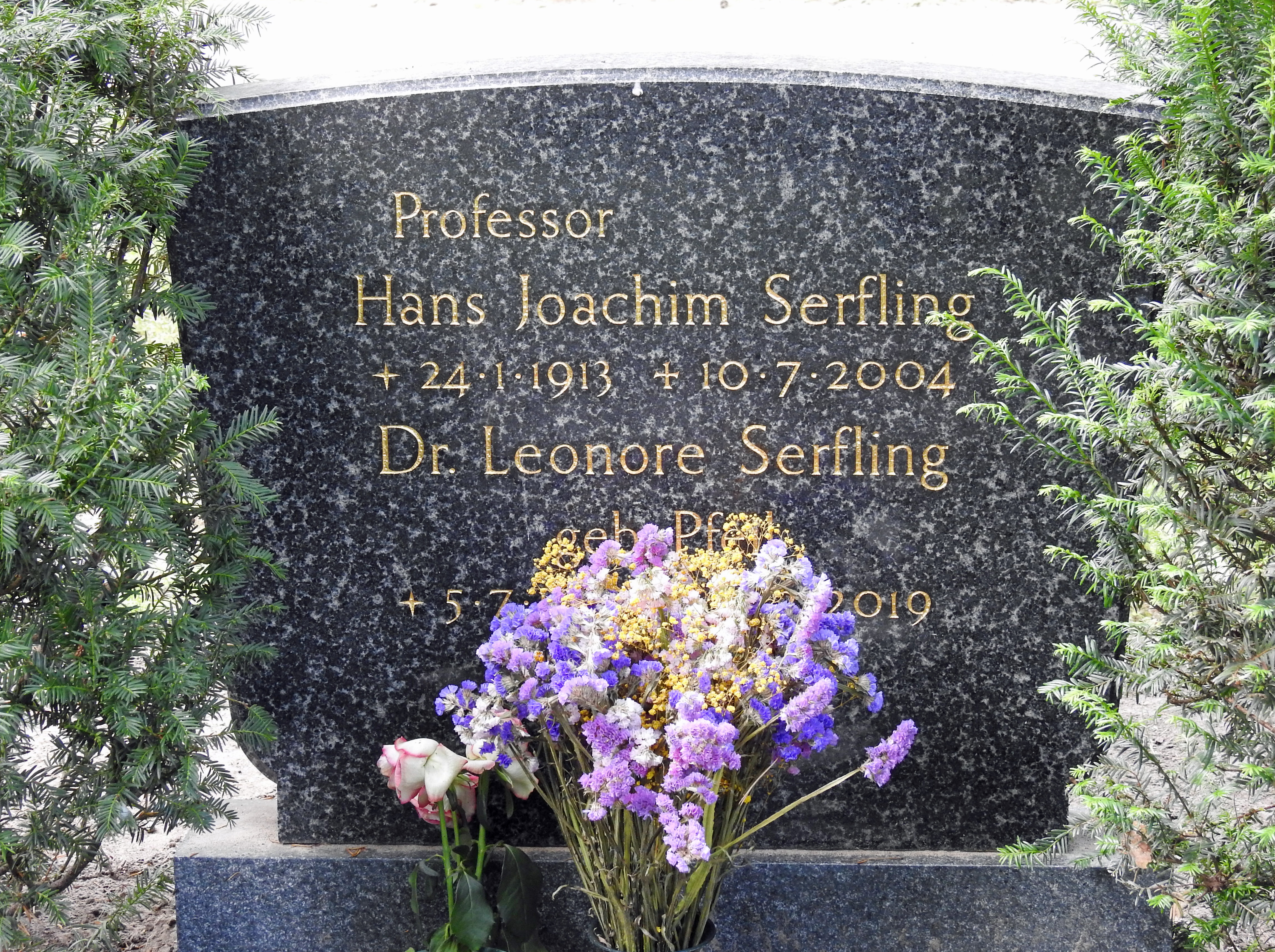 Grab von Professor Hans Joachim Serfling (24.01.1913–10.07.2004) auf dem Friedhof Pankow III, Grablage 34-21/22, in Berlin.